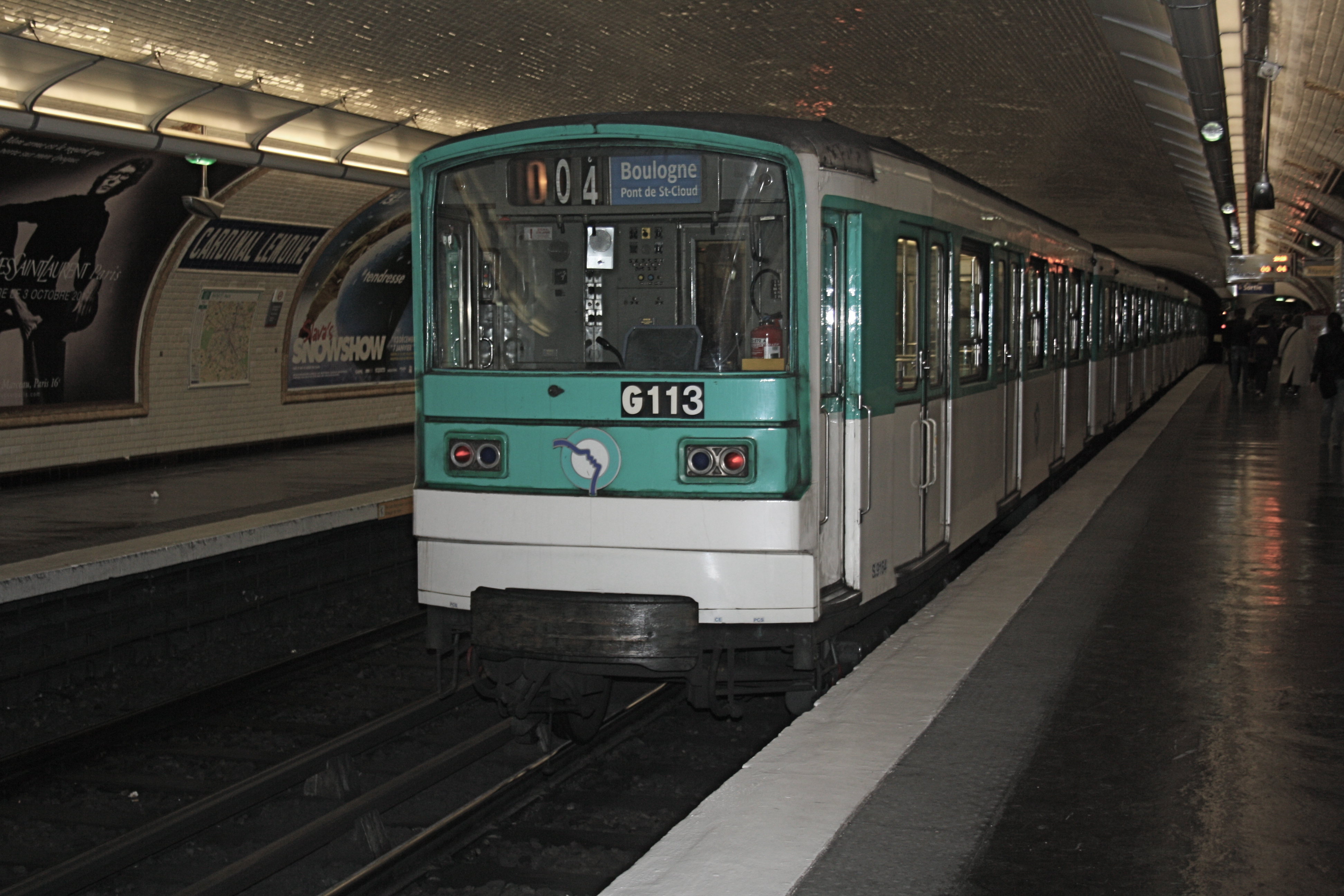 Station Cardinal Lemoine der Pariser Métrolinie 10